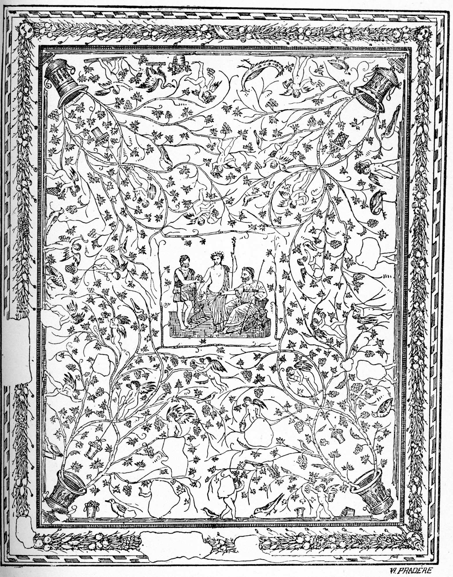 Dionysos faisant don de la vigne à Ikarios, mosaïque d'Uthina désormais au Musée du Bardo.